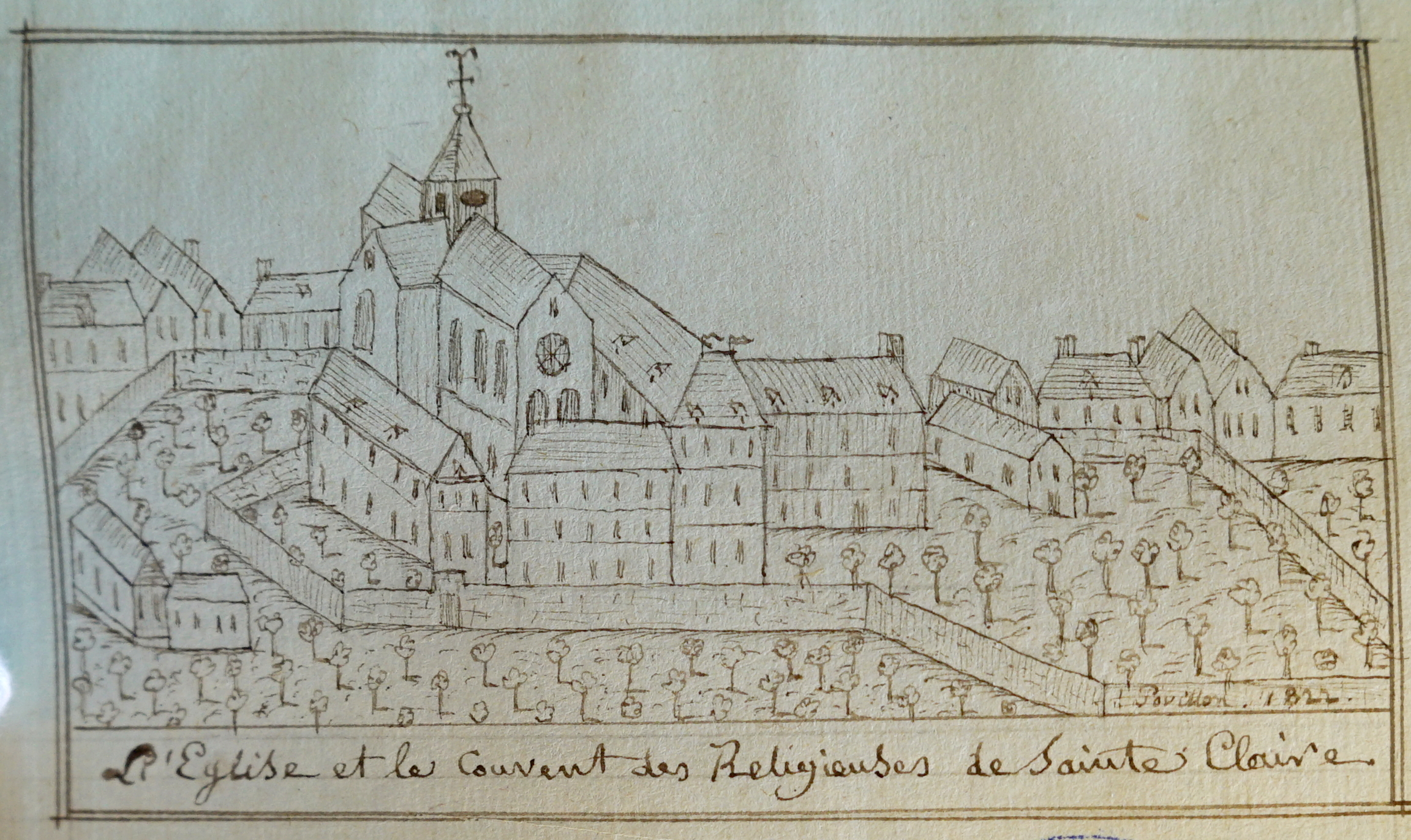 par E Povillon.